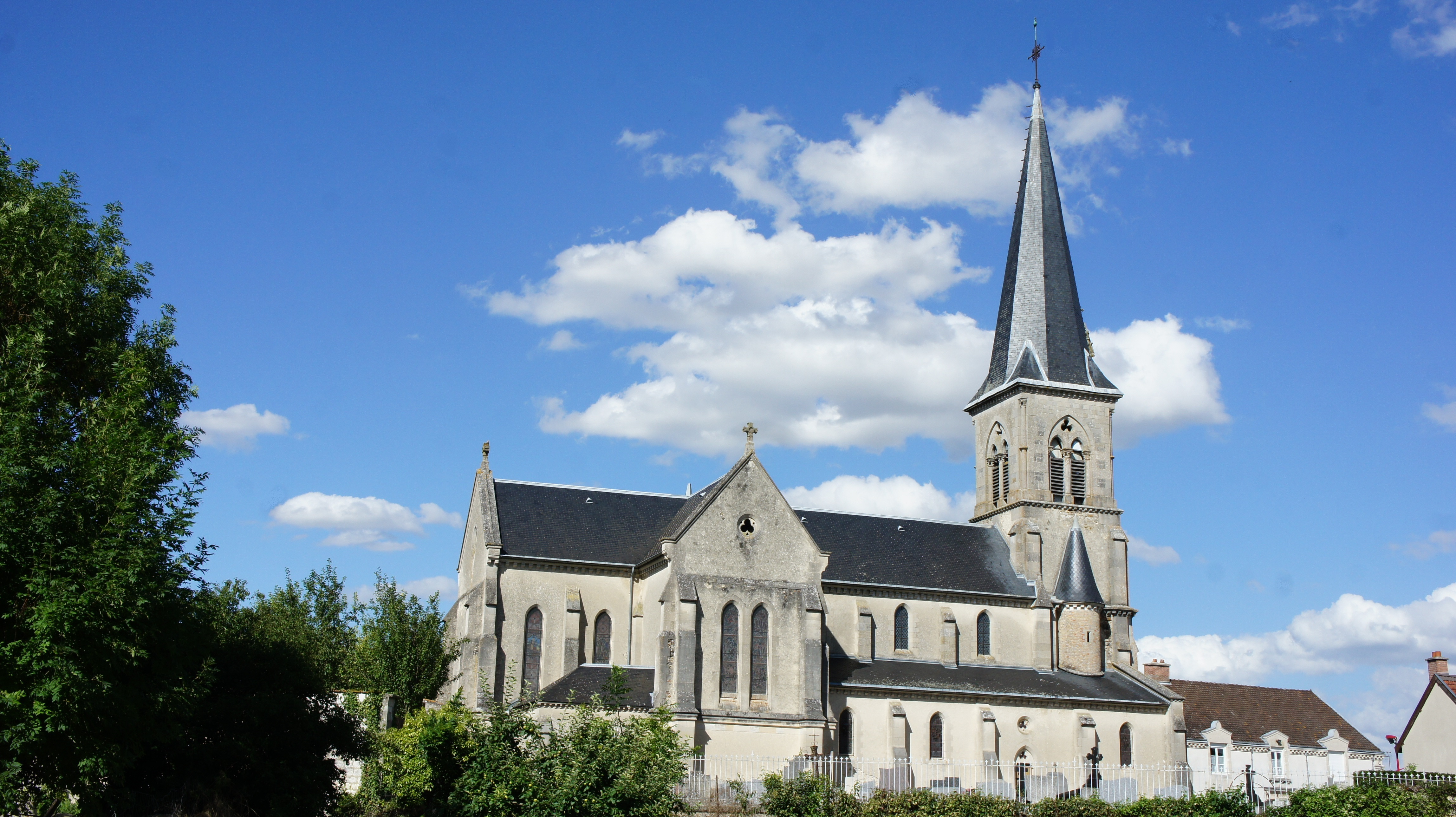 Vue de l'église à Aigny.